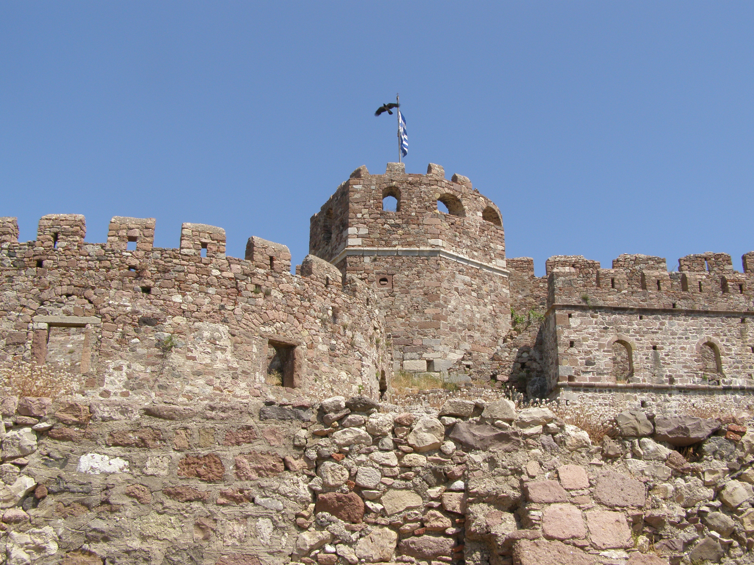 Castle of Mytilene